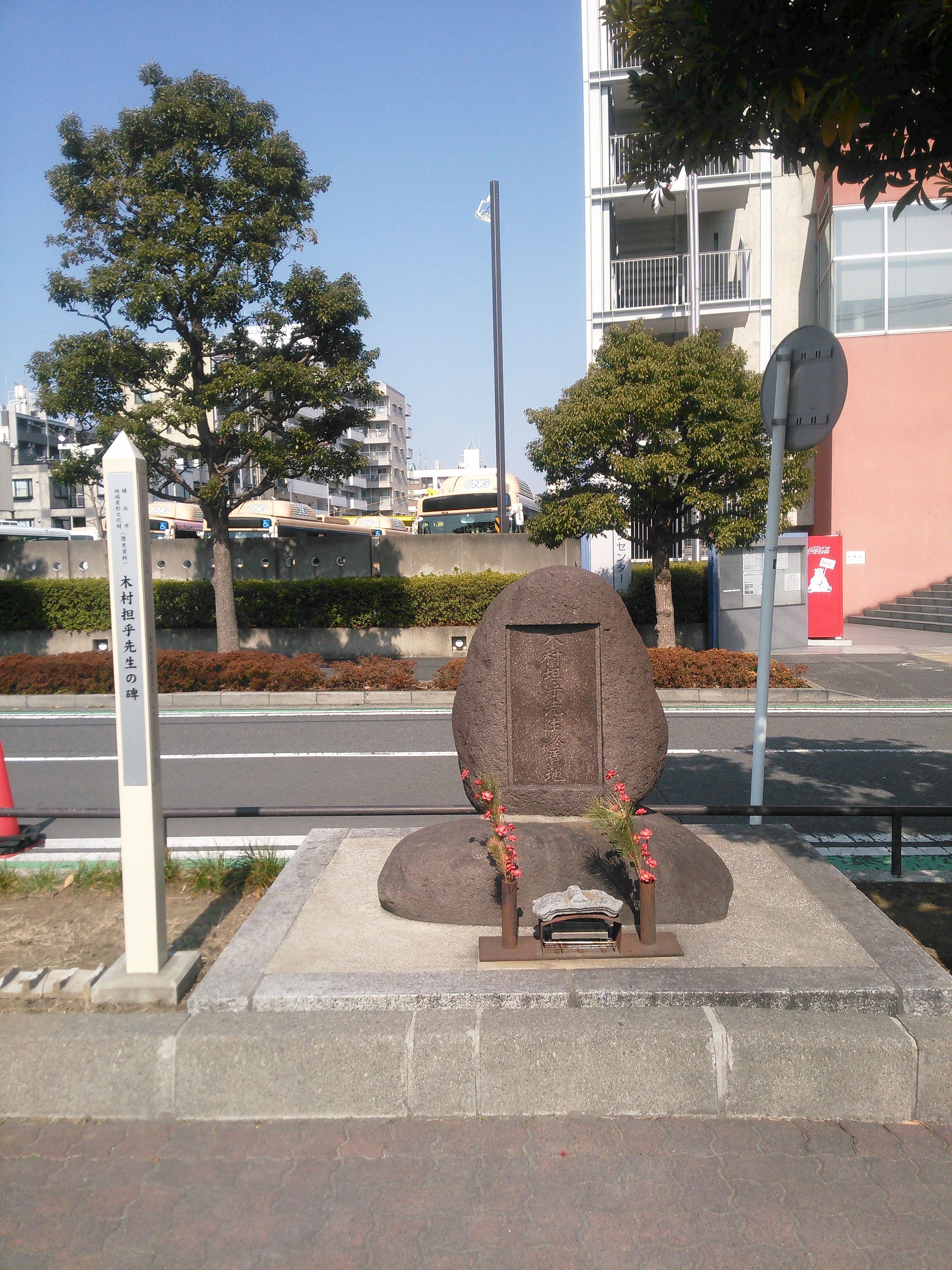 関東大震災で亡くなった教育者木村担乎終焉の地の碑。横浜市西区浅間町の、浅間町車庫前公園にある。